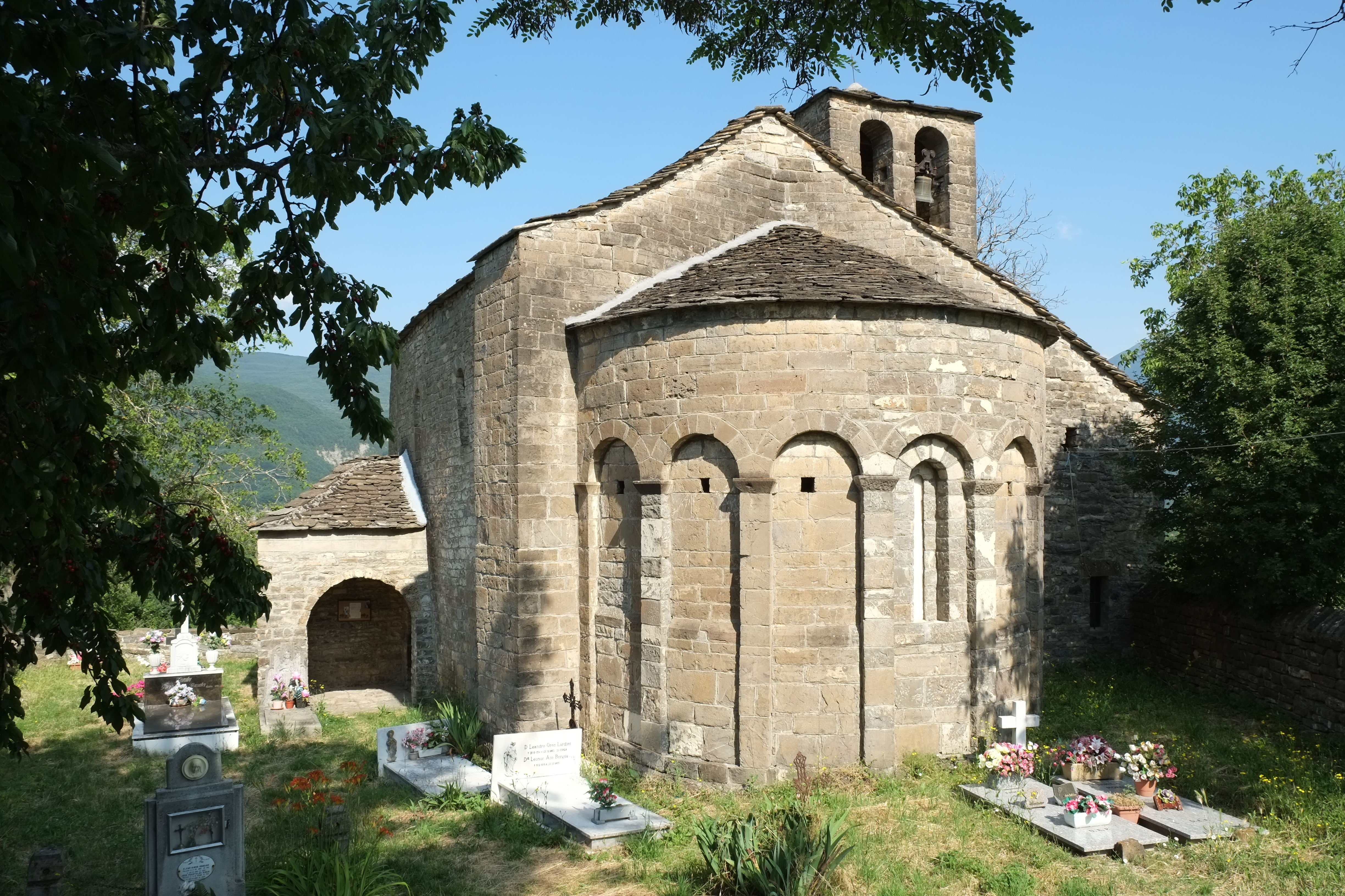 Kirche Santa Eulalia in Orós Bajo in der Provinz Huesca in der Region Aragonien (Spanien)